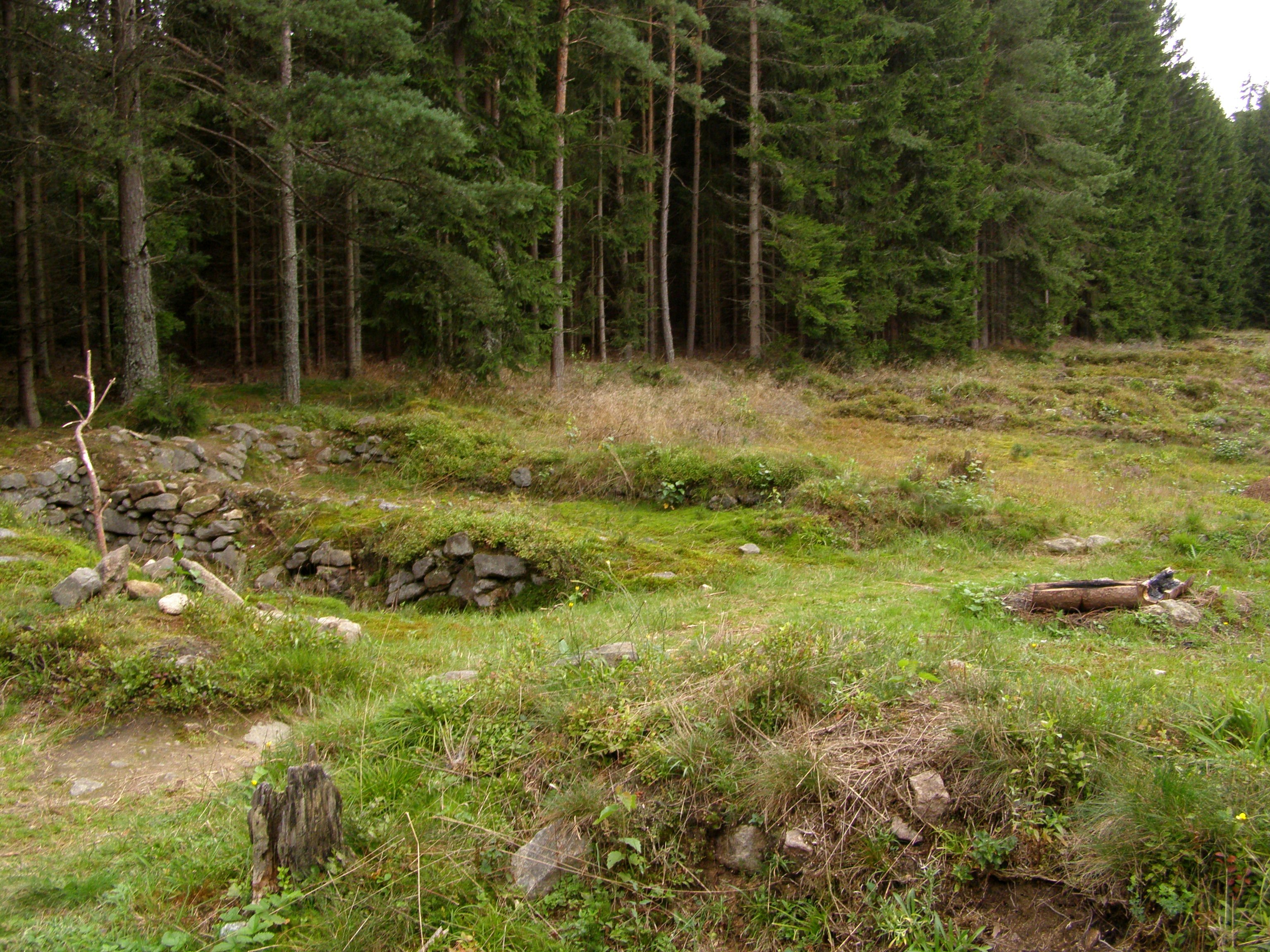 Zaniklá středověká osada Pfaffenschlag v katastru obce Slavonice